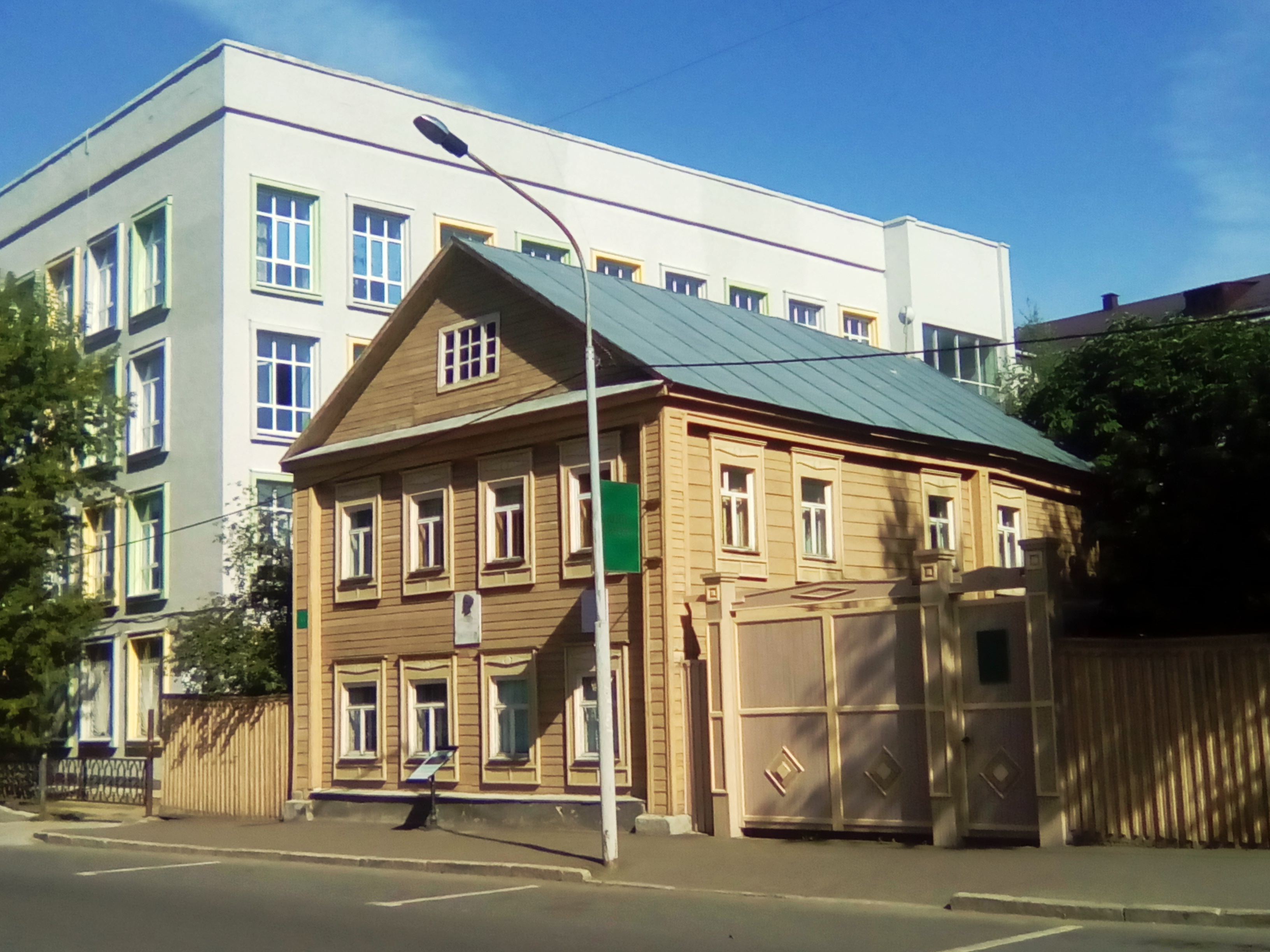 Дом, в котором жил и умер татарский просветитель Каюм Насыри: улица Парижской коммуны, 35, Казань, Татарстан